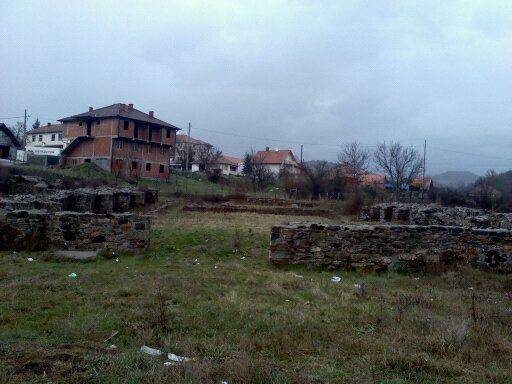 Srpski (latinica): Municipium DD je bio rimski grad čiji je život trajao od II do IV veka nove ere, a njegovi ostaci se nalaze u ataru naselja Sočanice, kod Ibra.